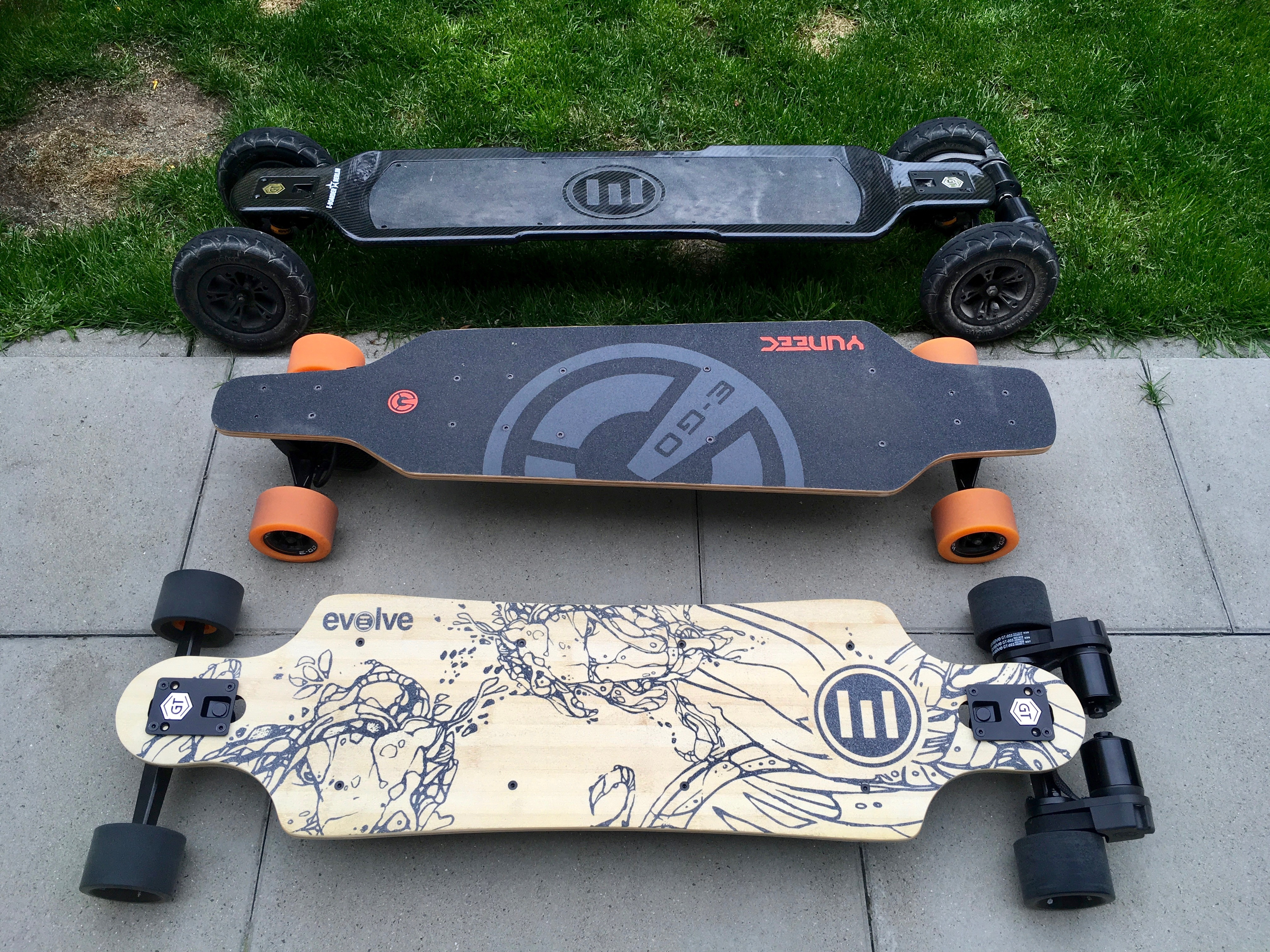 3 E-Boarder in verschiedenen Preisklassen. Von oben nach unten: 2100 EUR, 500 EUR und 1600 EUR. Oben eine All-Terrain Bereifung.